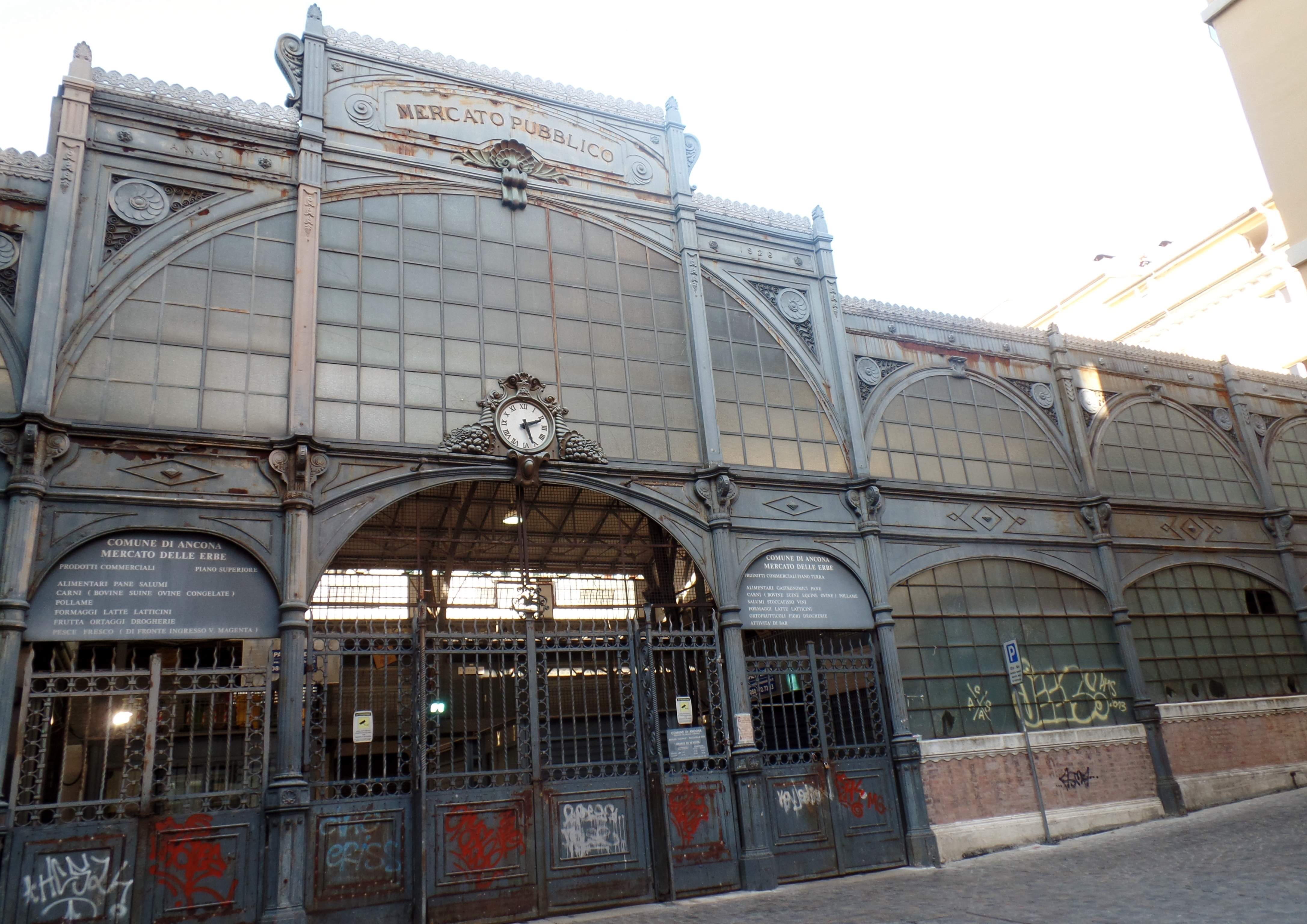 Mercato delle erbe Ancona anno 1926 - entrata